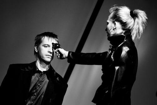 Galambos Attila (Jean) és Pásztor Anna (Julie) a MonoPorNo című előadásban. Budapest, RS9 Színház.